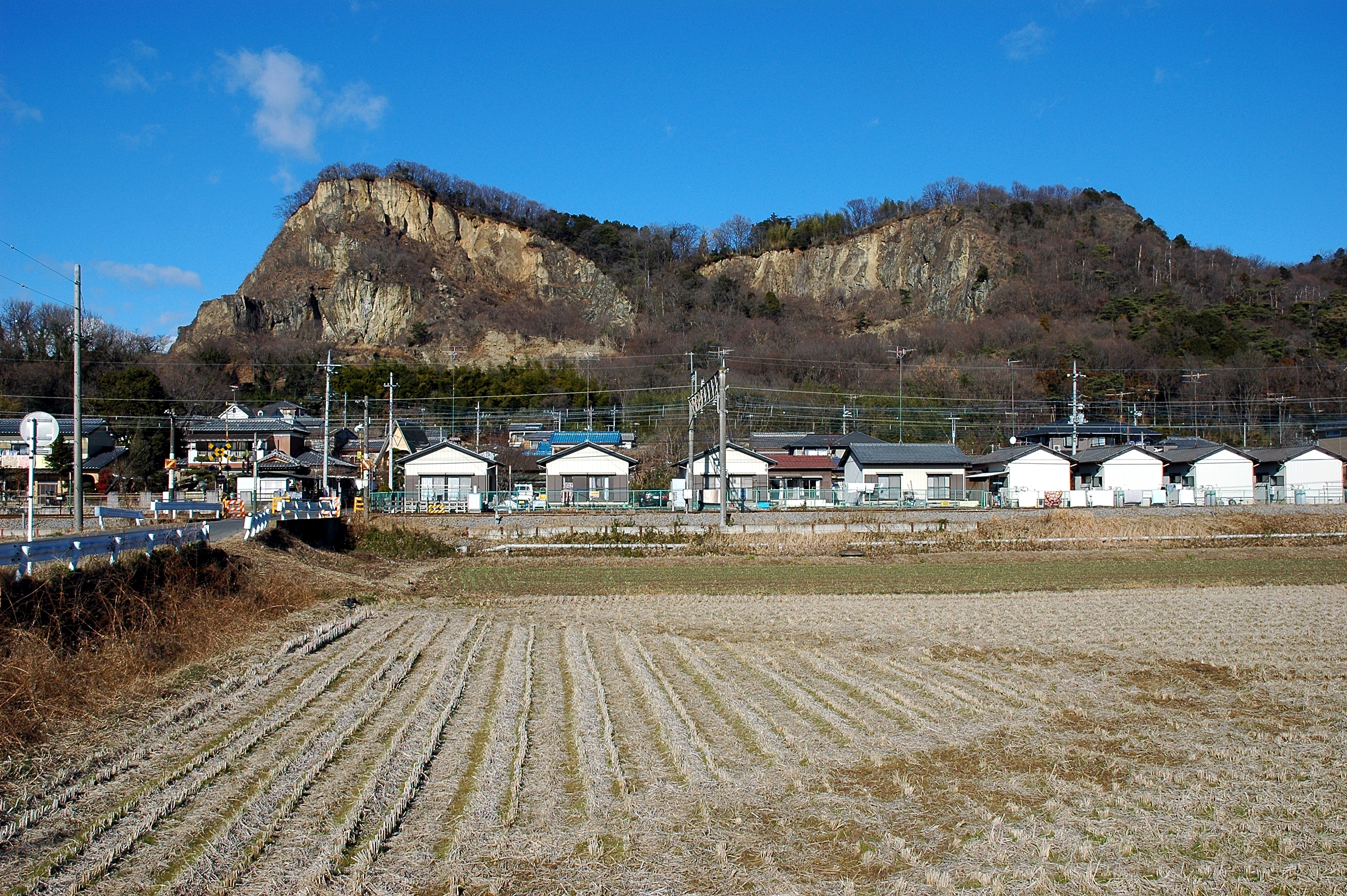 Mt. Iwafune (岩船山)